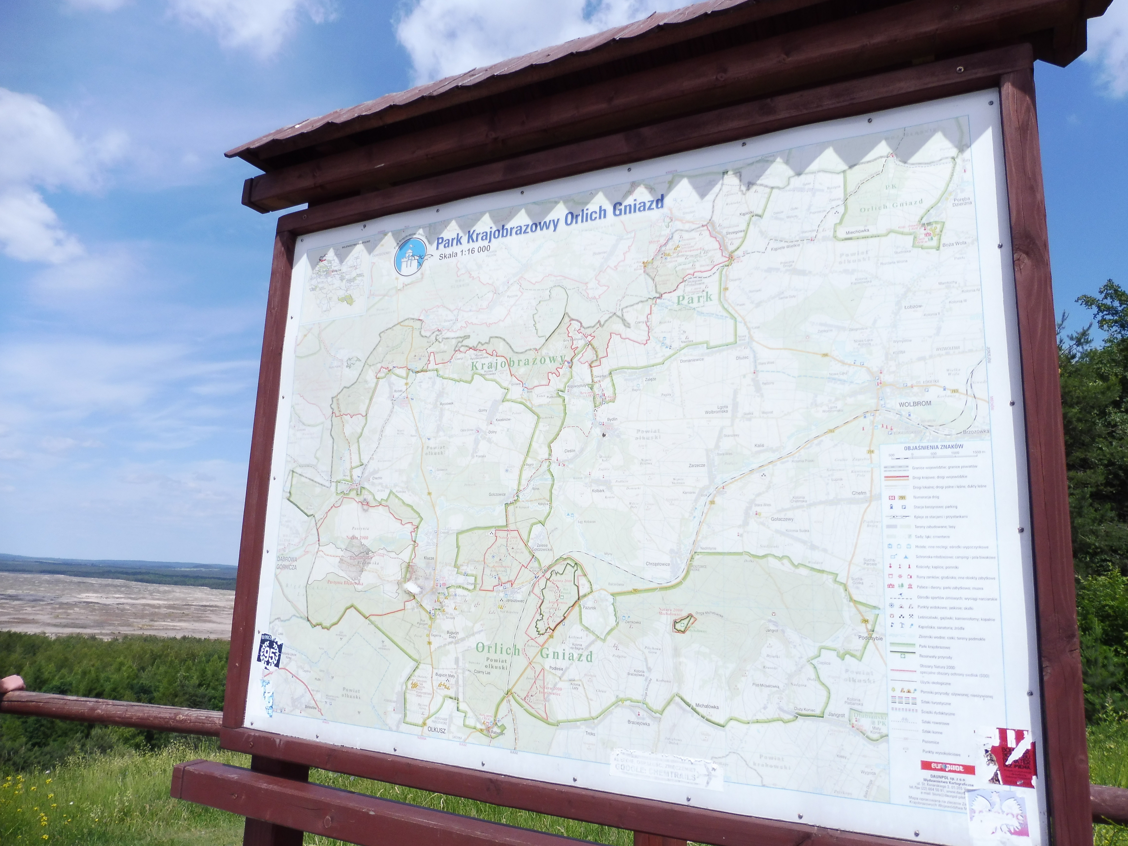 Specjalny obszar ochrony siedlisk: Pustynia Błędowska This is a photography of protected area with CRFOP ID PL.ZIPOP.1393.N2K.PLH120014.H